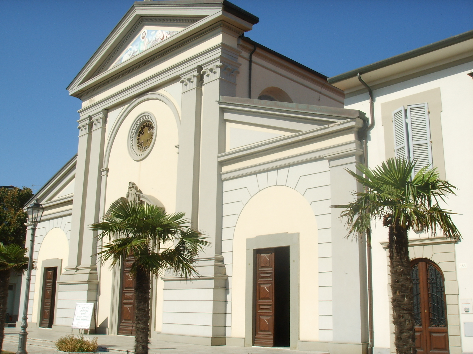 Chiesa di Torre del Lago Puccini.